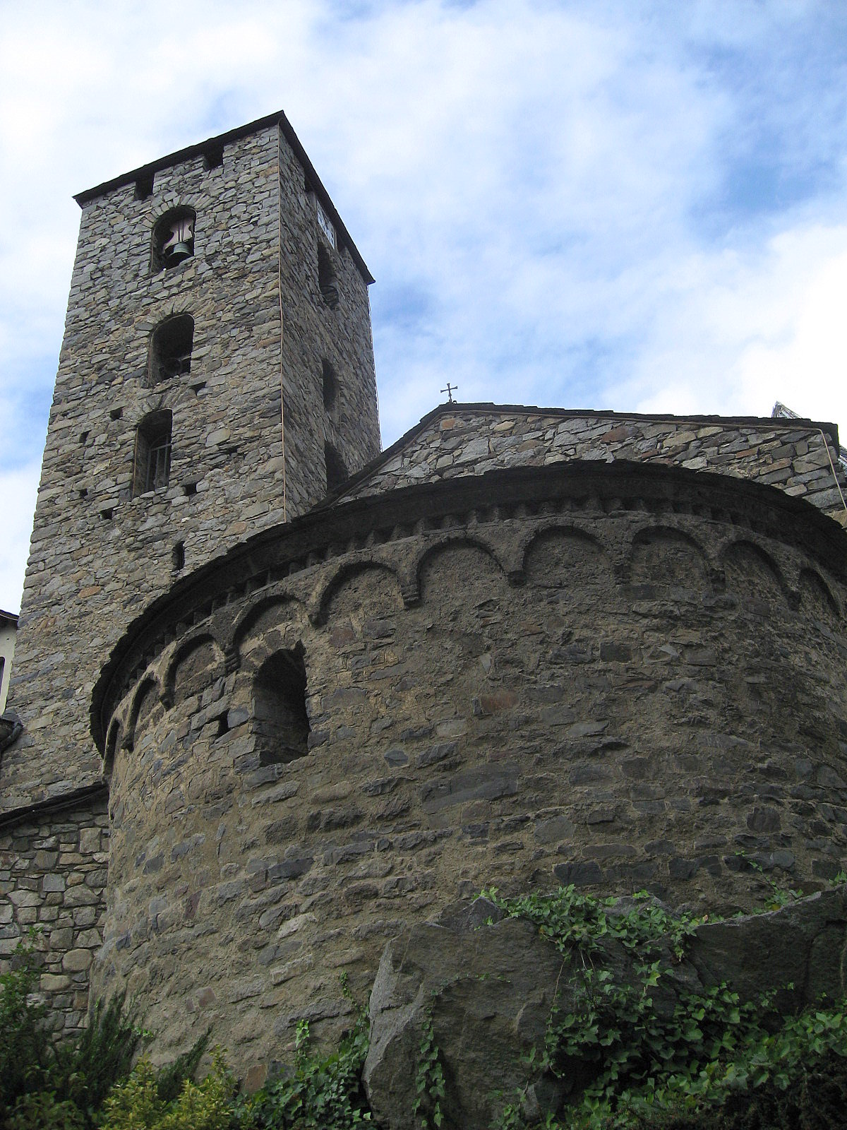 Església parroquial de Sant Esteve d'Andorra la Vella